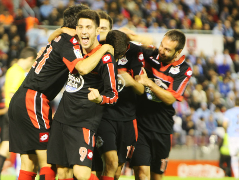 Celebración do gol do Deportivo no partido Celta-Dépor do 27 de outubro do 2012.